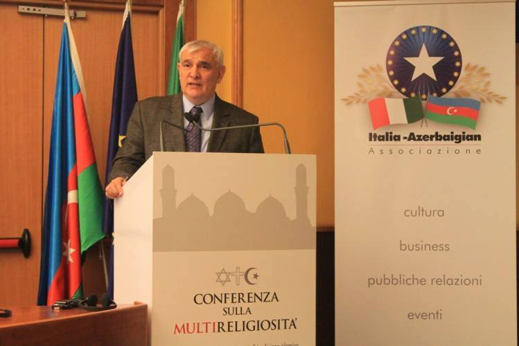 Konfr